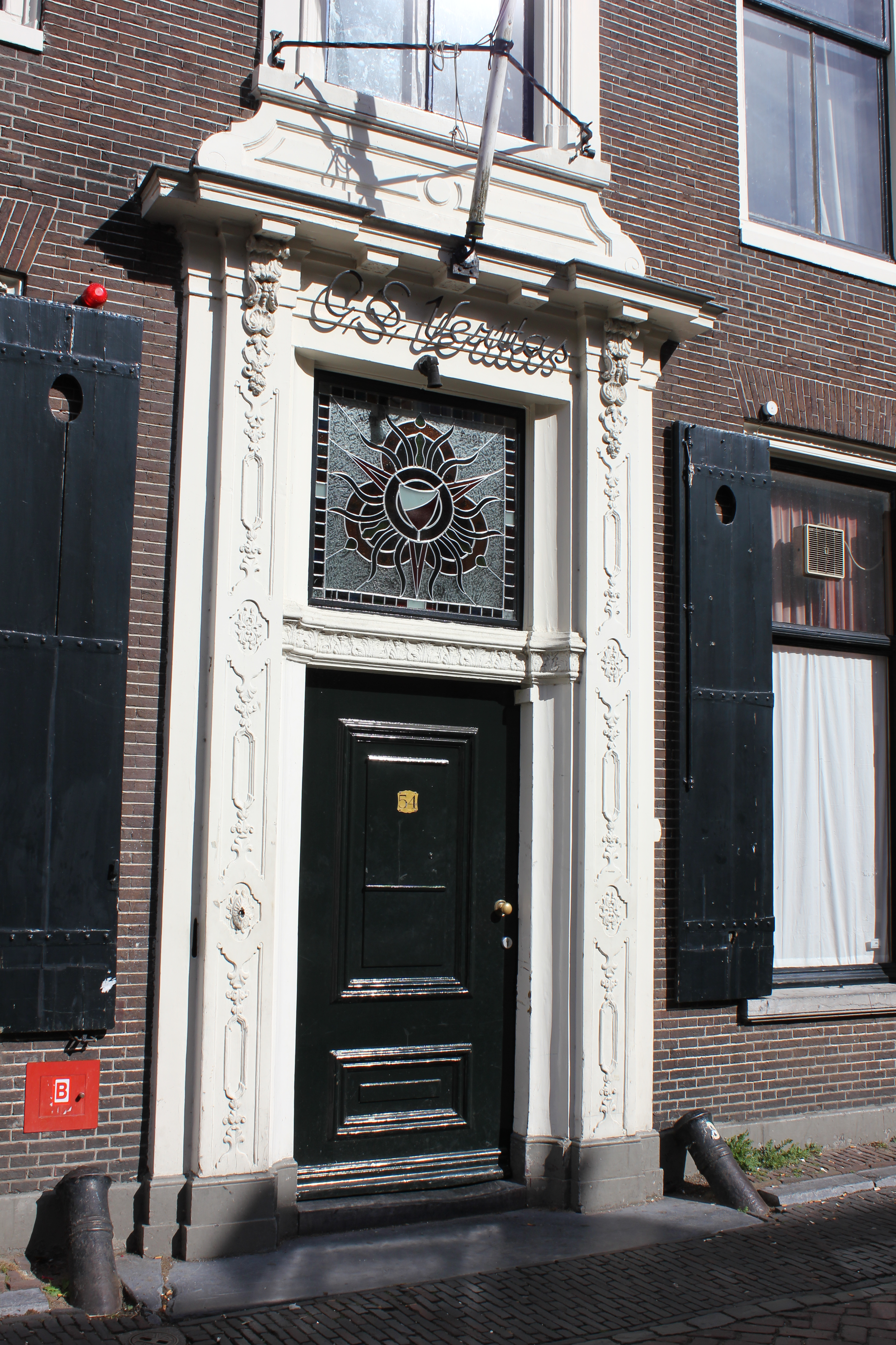 Rijksmonument Kromme Nieuwegracht 54 in Utrecht